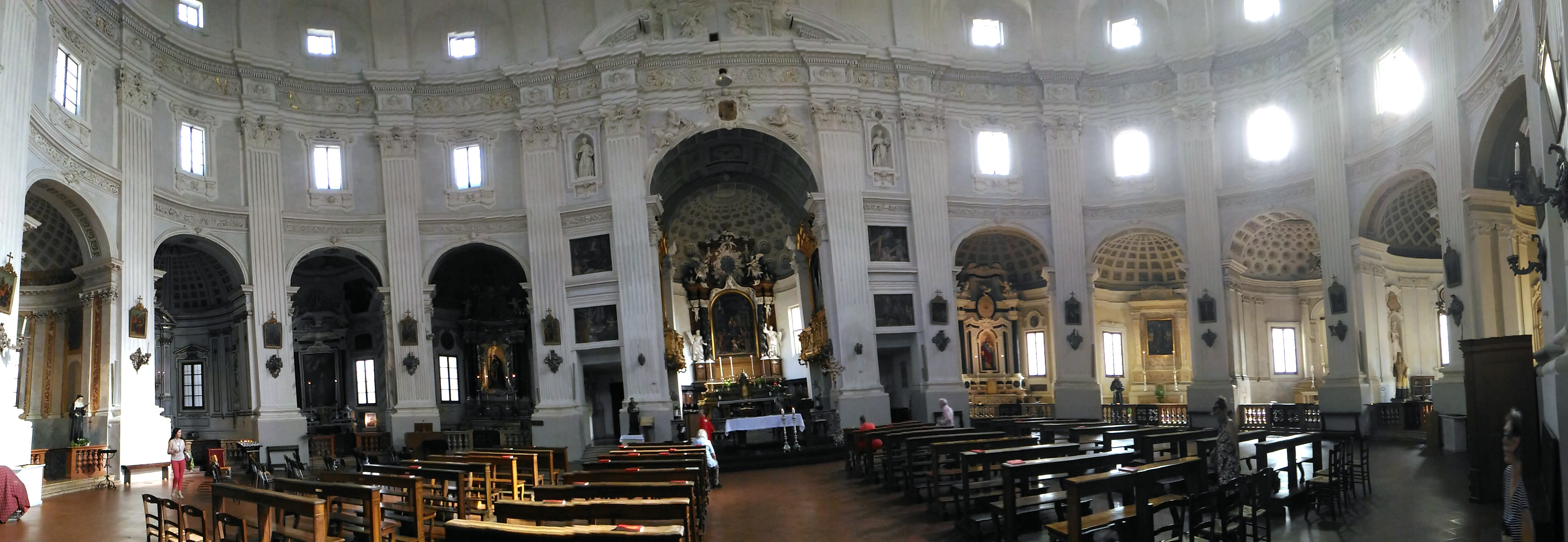 chiesa annunziata